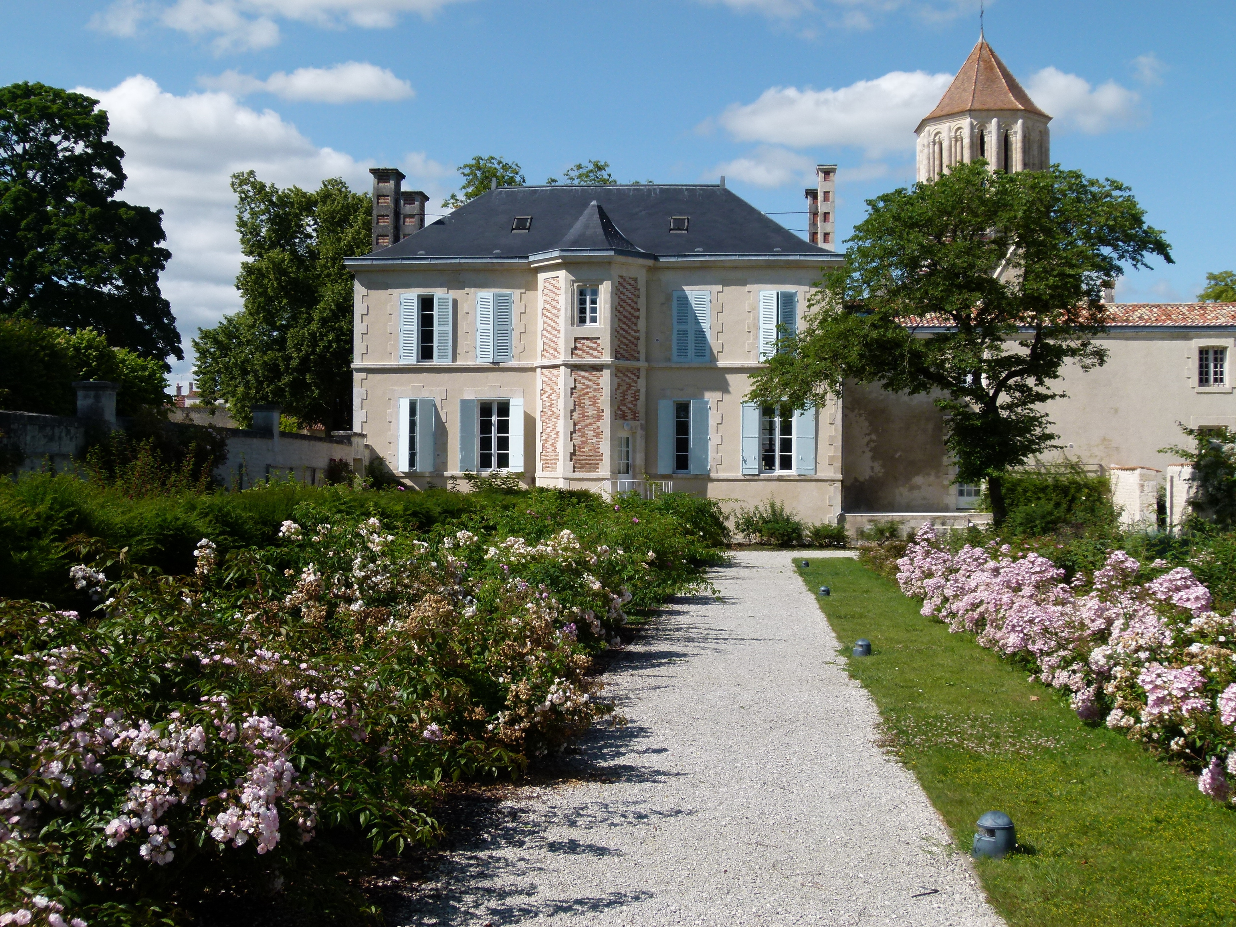 Une autre vue de la roseraie du Château de Surgères.